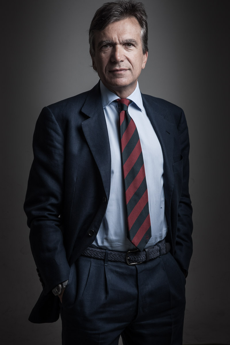 Paolo Basilico